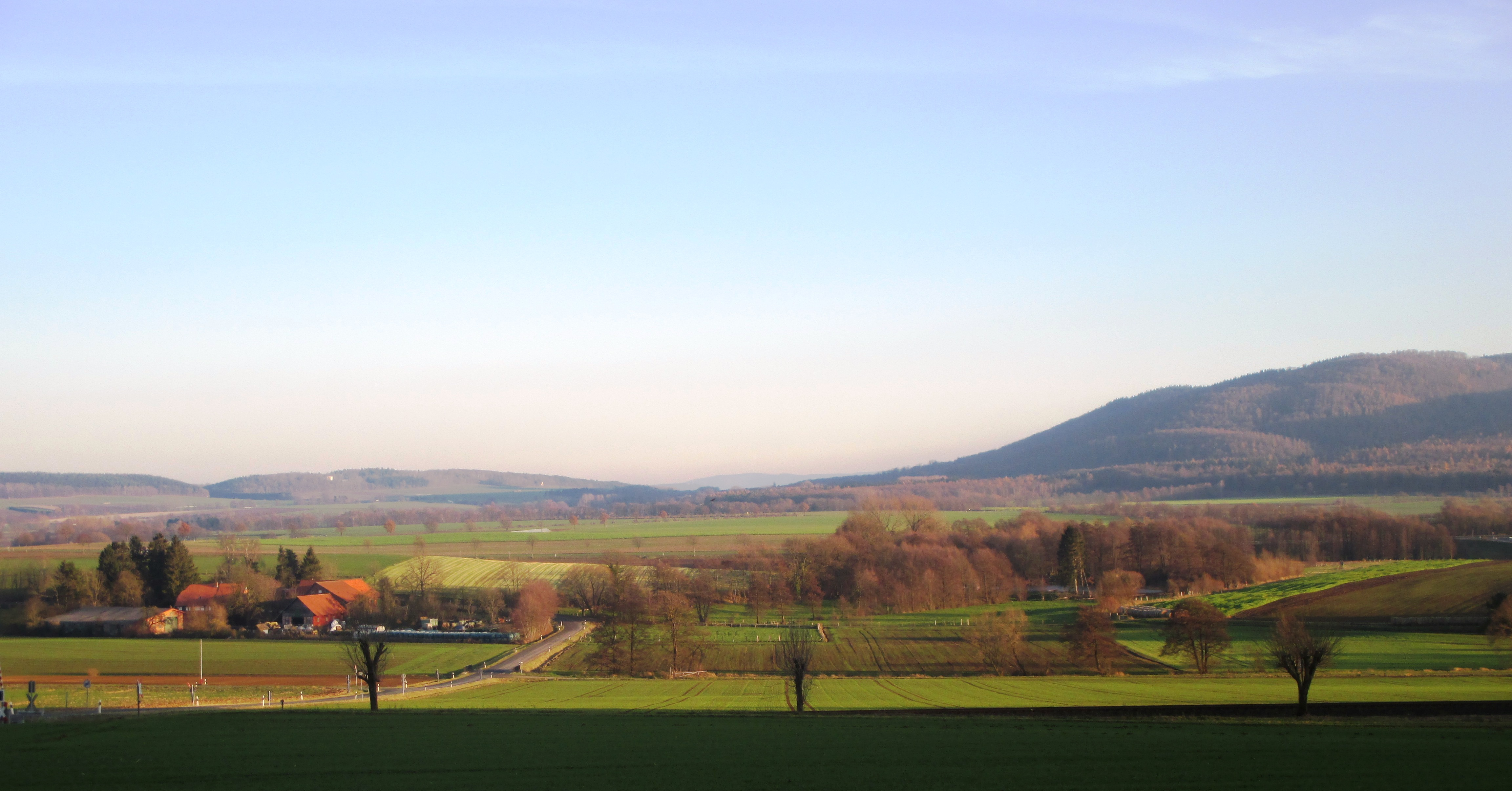 Pöbbeckenmühle mit gleichnamigem Naturschutzgebiet (rechts im Bild), Blick von Westen, Lutter am Barenberge, Landkreis Goslar